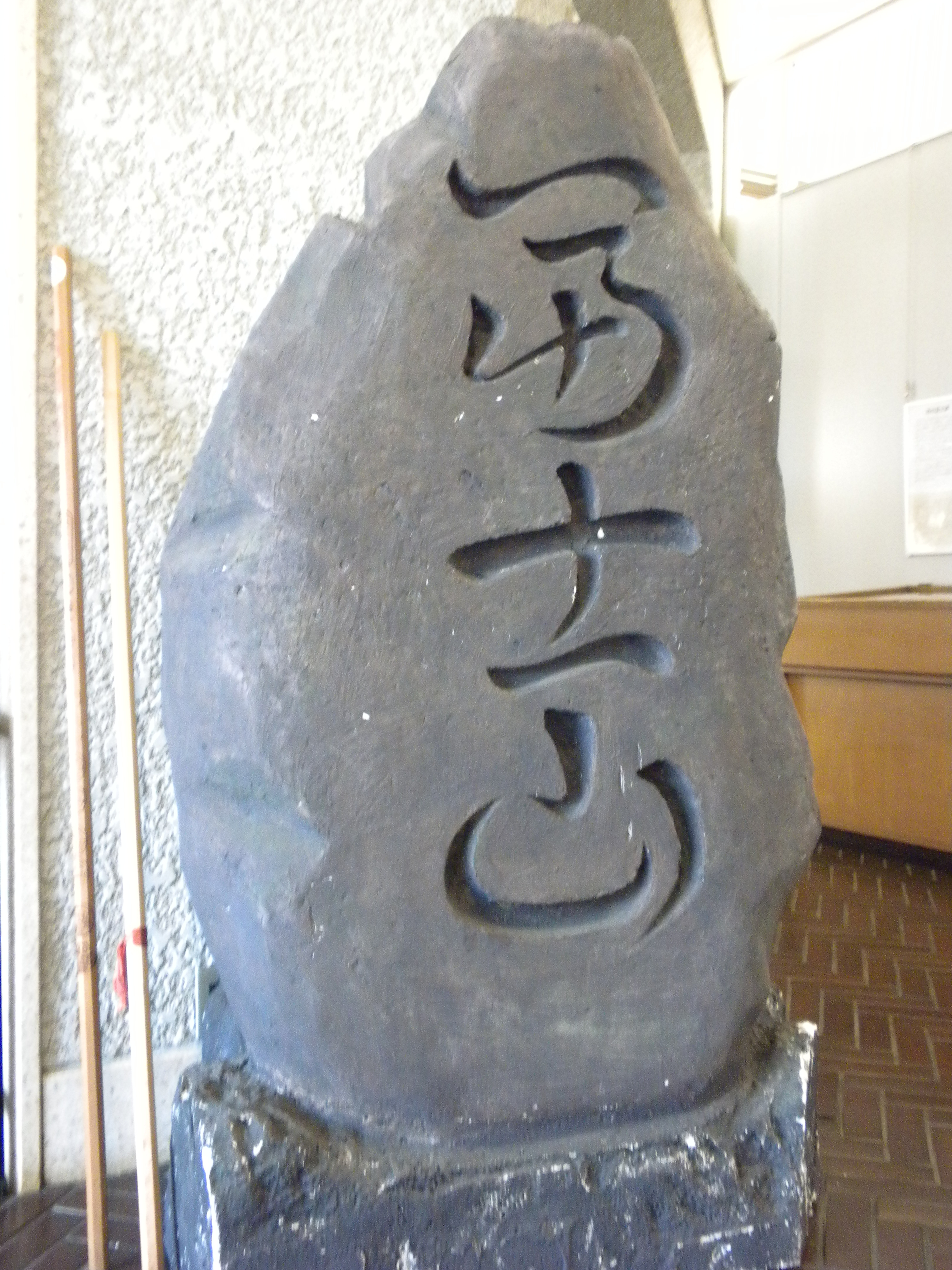 富士山の登山道脇（村山浅間神社）に所在する石碑（展示にて）